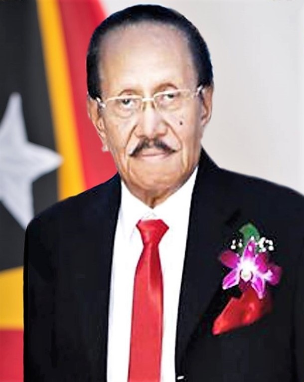 Begräbnis von Clementino dos Reis Amaral